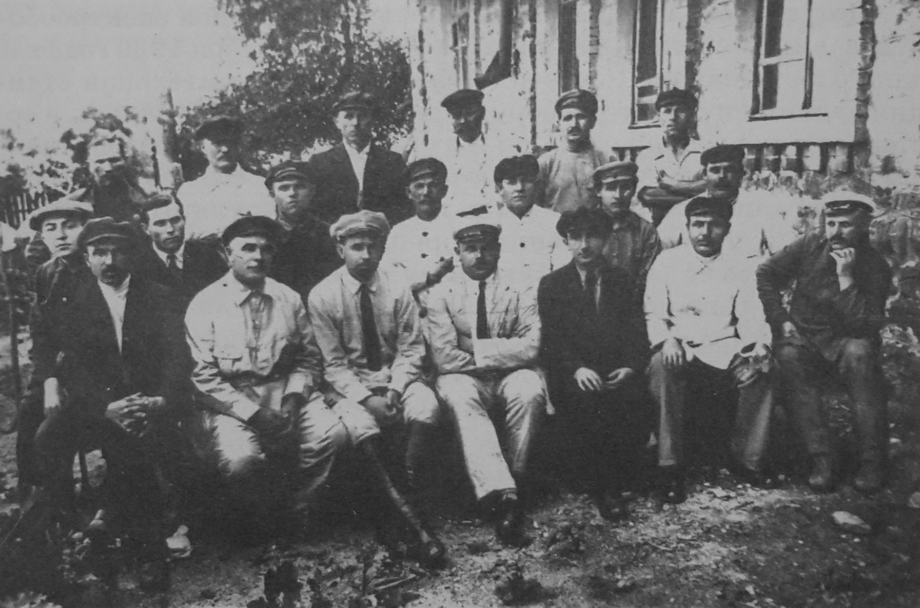 Сотрудники МакНИИ, 1928 год